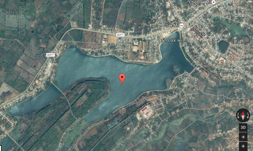 vị trí Hồ Tây - Đăk Mil